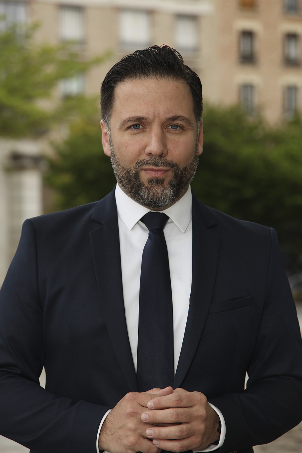 Photo officielle